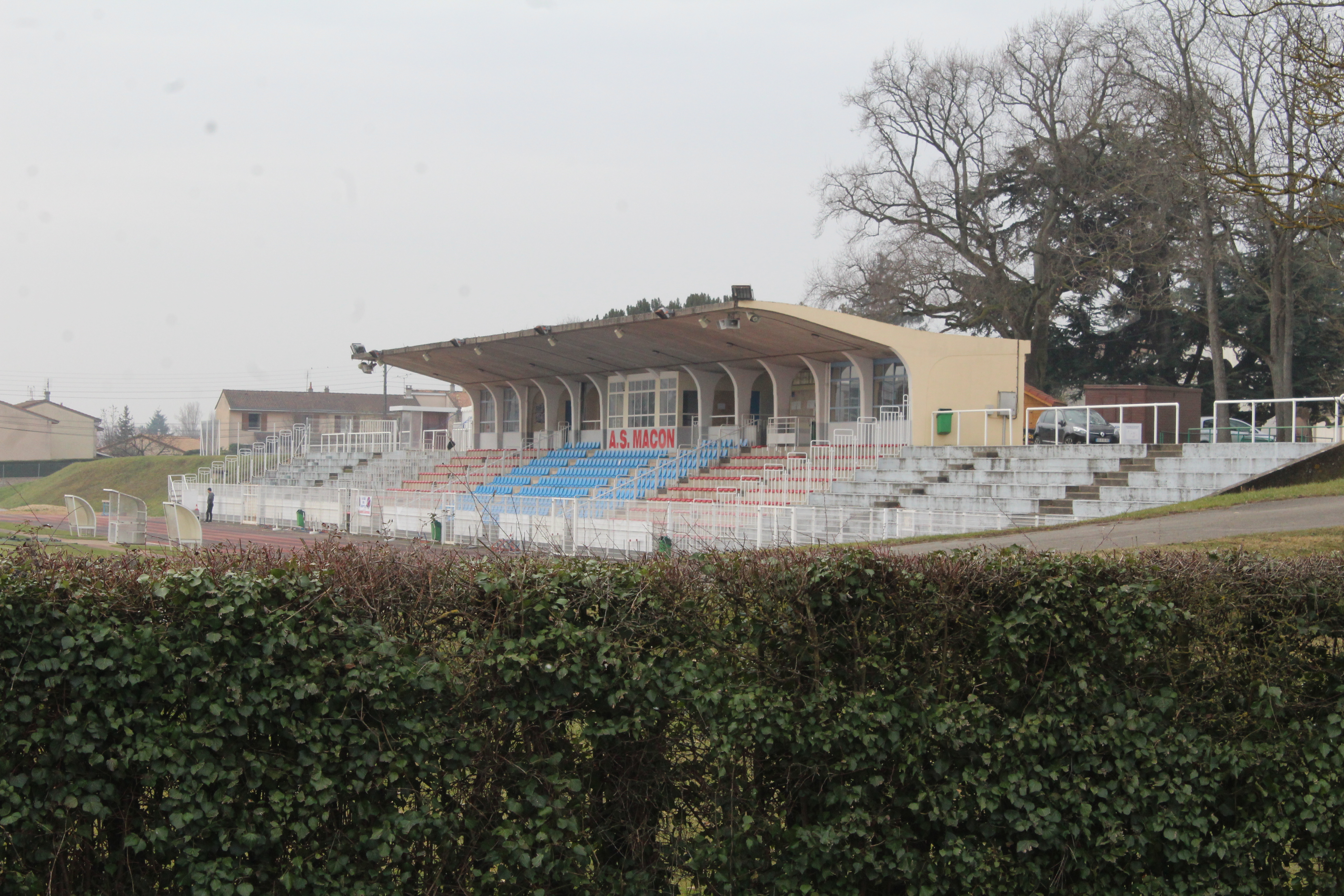 Tribune du stade Émile Vanier à Mâcon.